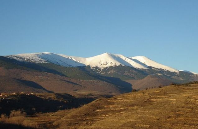 Moncayo in Autumn; Moncayo en Otoño